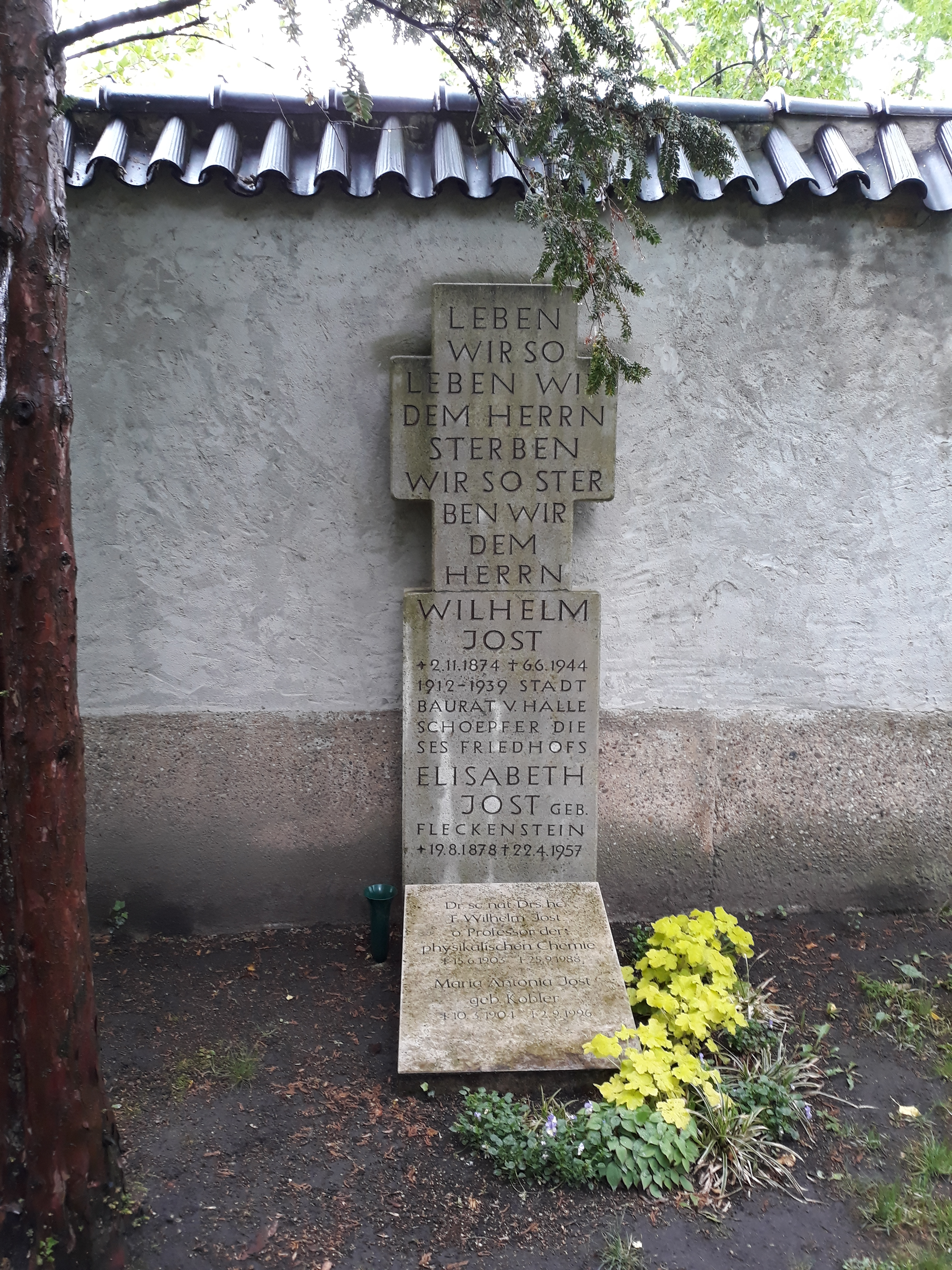 Das Grab des deutschen Physikochemikers Wilhelm Jost im Grab seiner Eltern auf dem Gertraudenfriedhof in Halle (Saale).